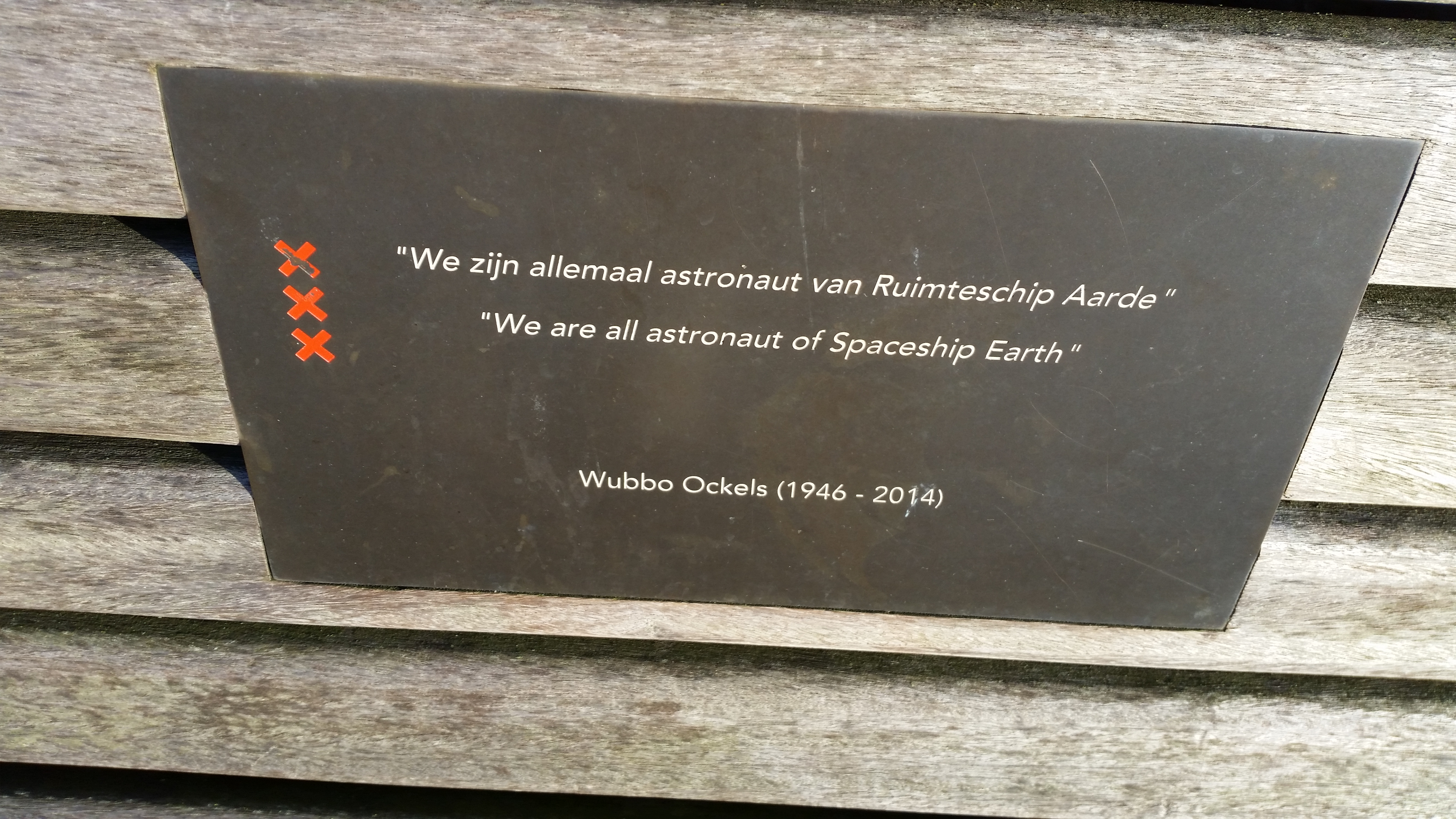 De in 2014 geplante Wubboboom ter nagedachtenis aan Wubbo Ockels